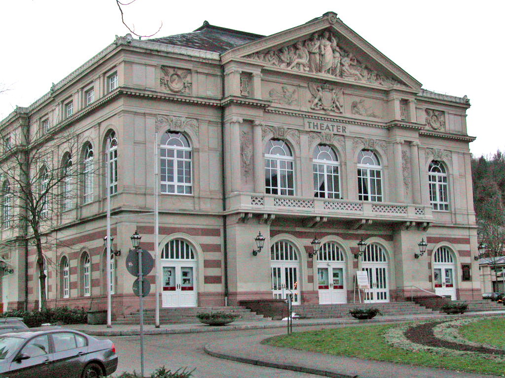 Sujet:Den Theater vu Baden-Baden Source:Eege Foto vum lb::lb:User:Alexandra Lizenz:GFDL